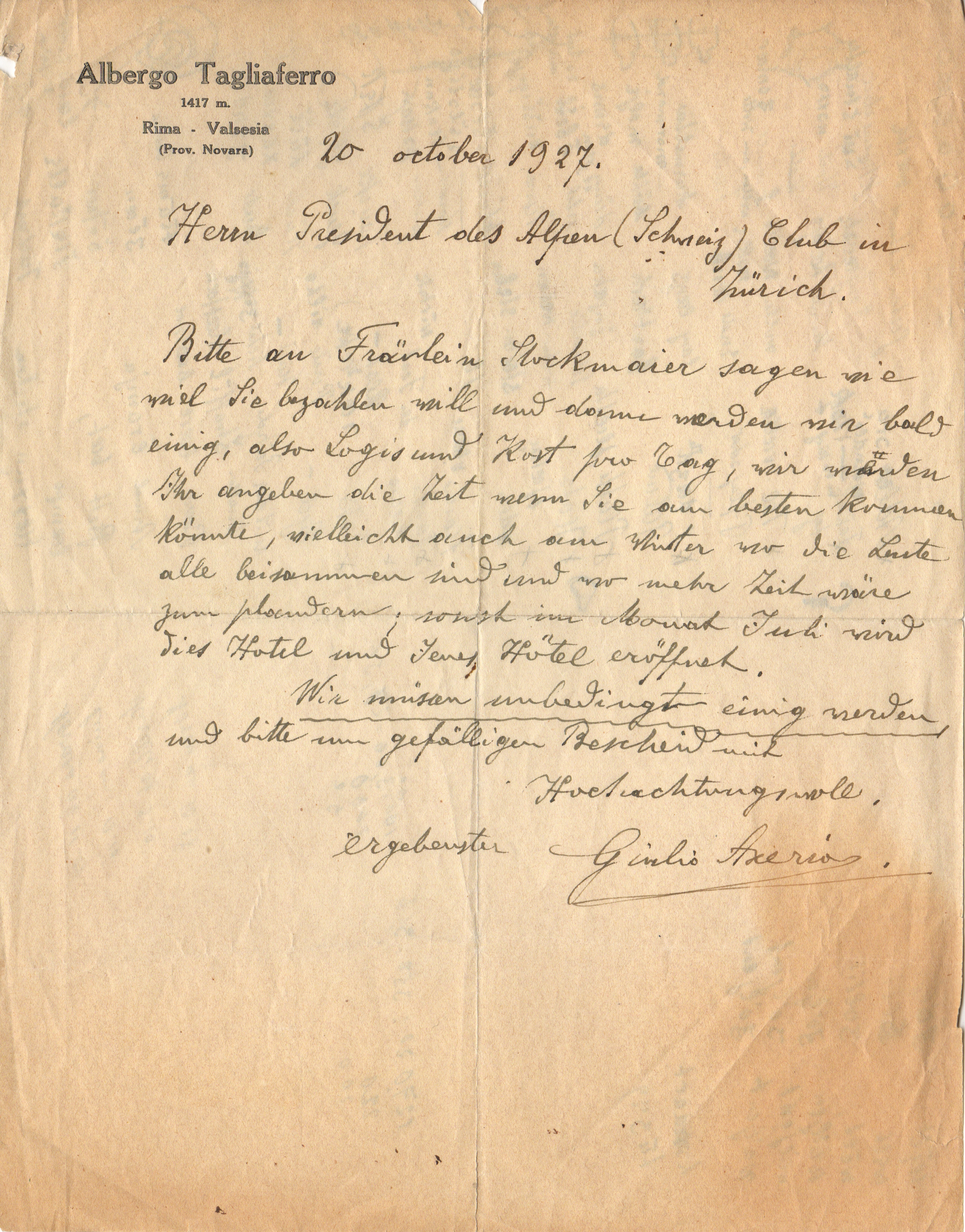 Brief von Giulio Axerio, Rima Valsesia, vom 20. Oktober 1927 an den Präsidenten des Schweizerischen Alpen Clubs zu Handen der Schweizer Dialektologin und Volkskundlerin Clara Stockmeyer (Archiv des Schweizerischen Idiotikons, Zürich)